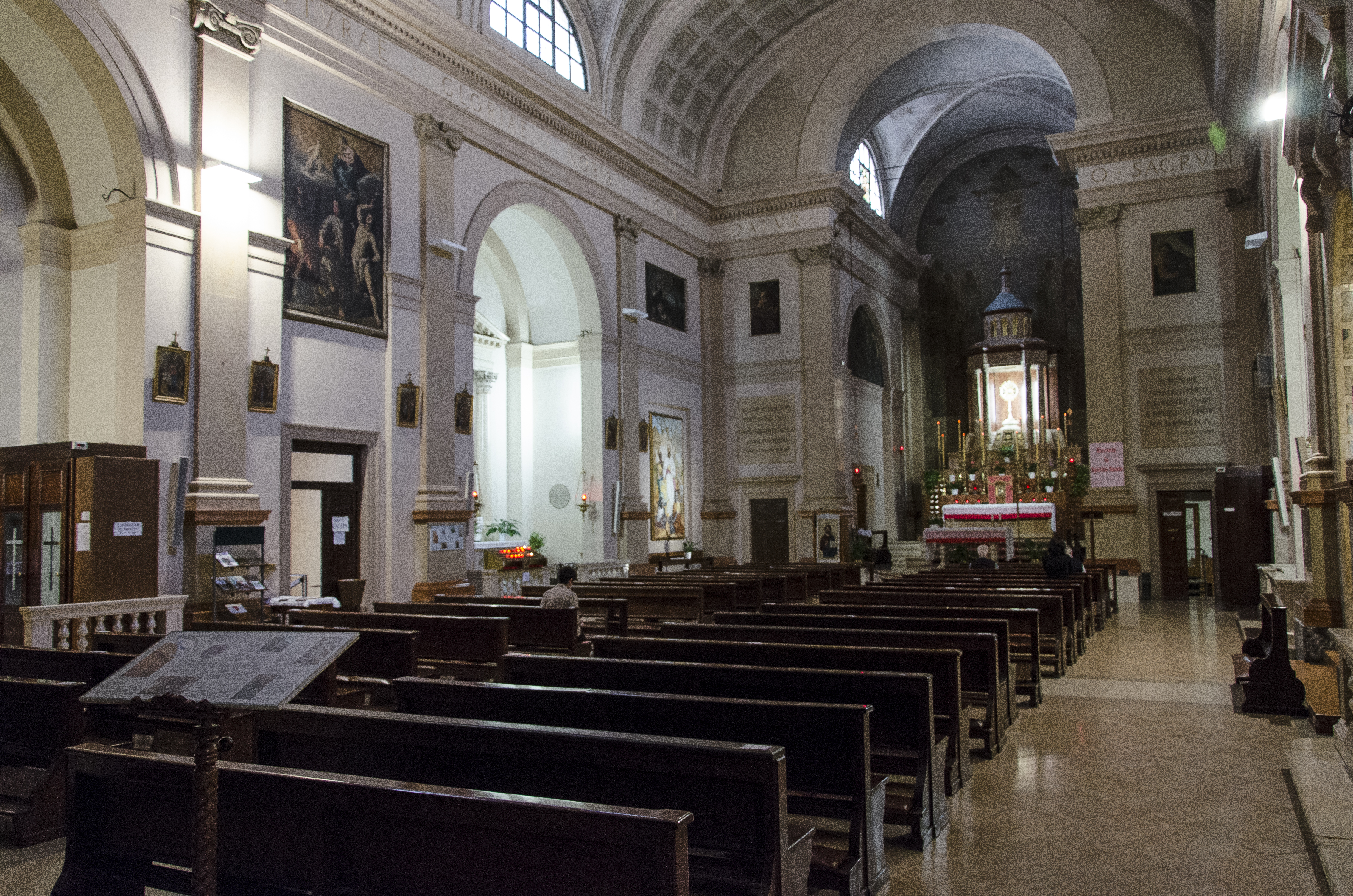 Chiesa di San Tomio a Verona, interno.